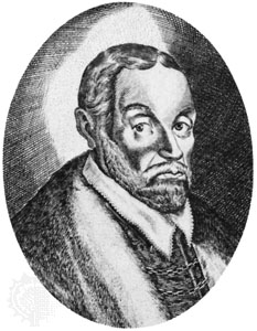 Ritratto di Battista Guarini (Ferrara, 10 dicembre 1538 - Venezia, 7 ottobre 1612).